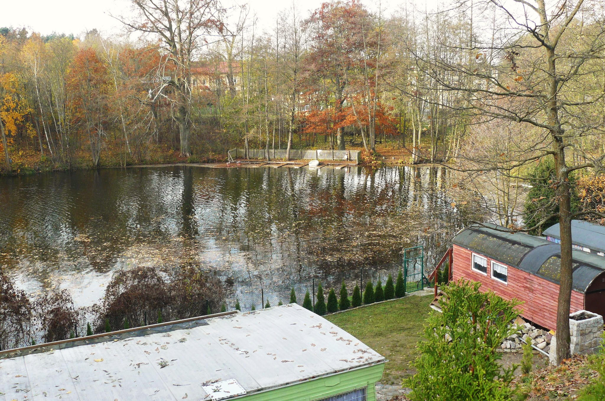 Staw Goszczanowski - zapora w Goszczanowie.